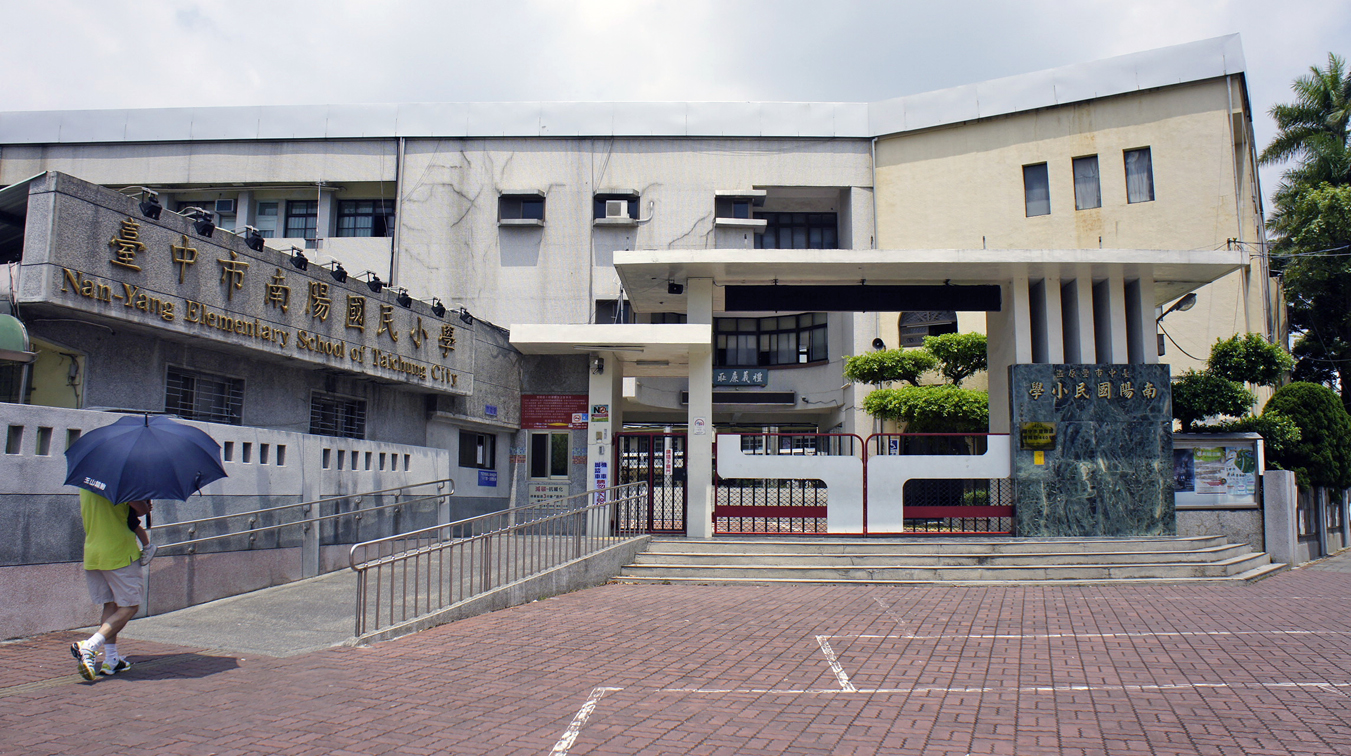 臺中市豐原區南陽國民小學。